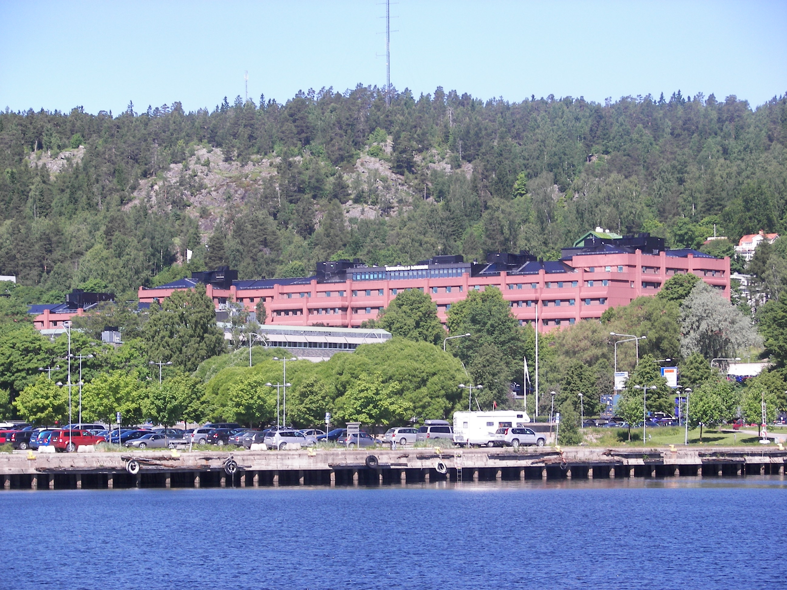 Sundsvalls kommunhus sett fån Inre hamnen, Sundsvall